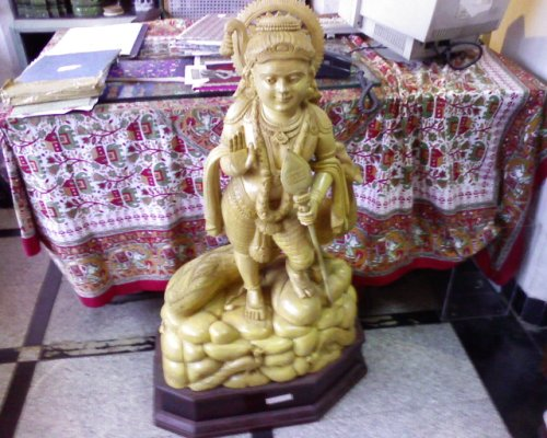 Statue Chambre Papa